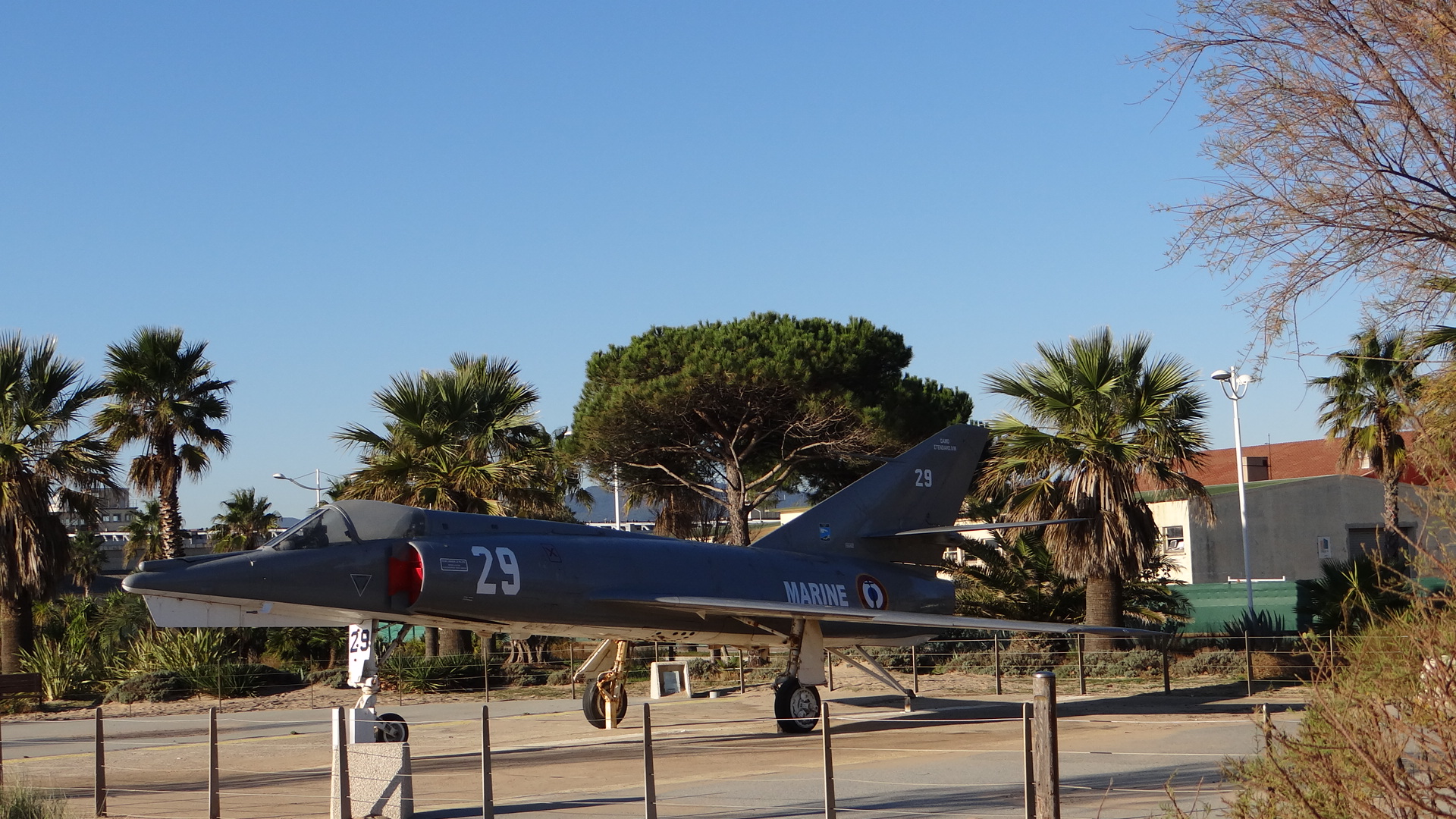 Etandard IVM Dassault